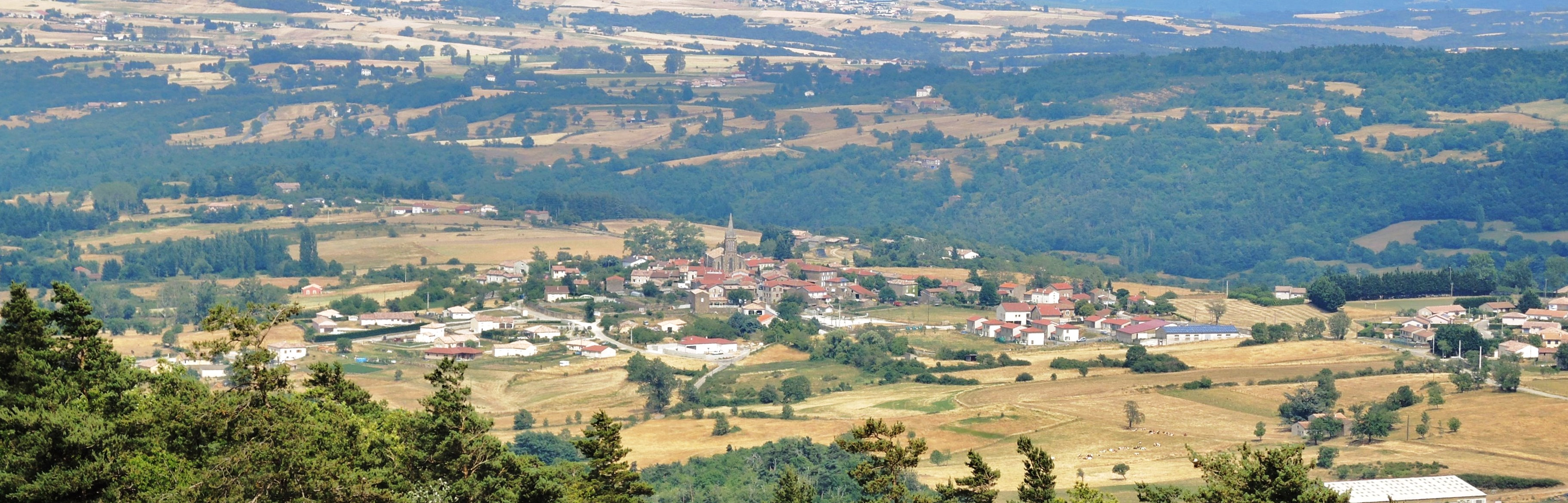 Préaux vue générale